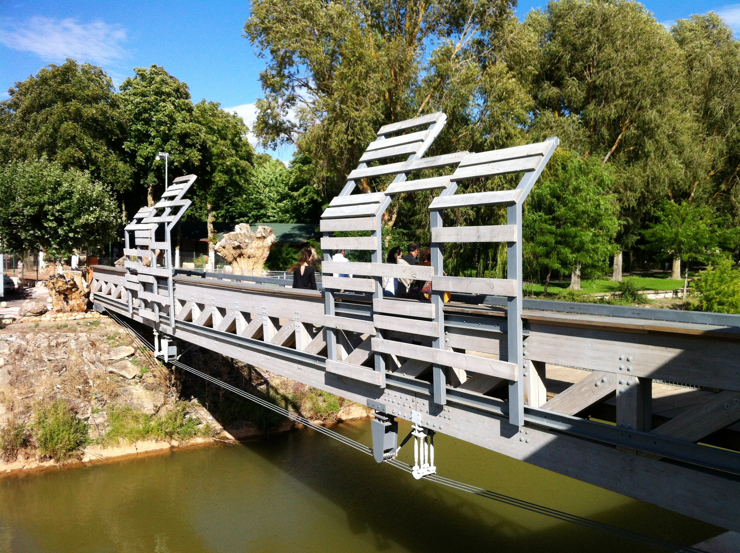 Pasarela de la Casa del Cangrejo.